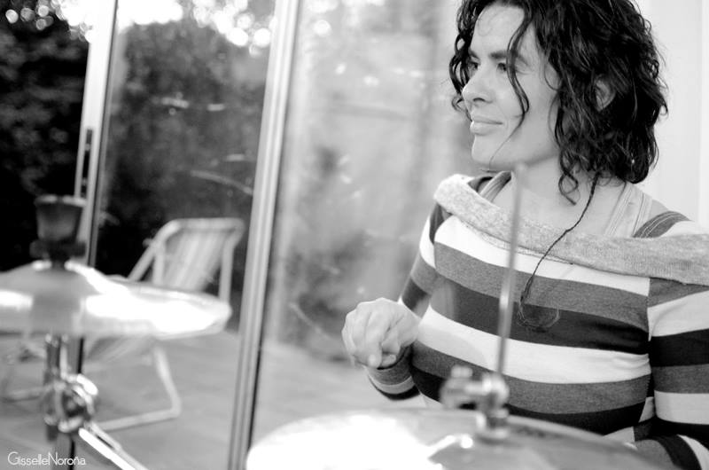 Ana durante una grabacion